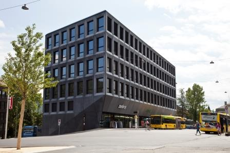 Geschäftshaus Uno Liestal Quelle: Informationsdienst Stadt Liestal